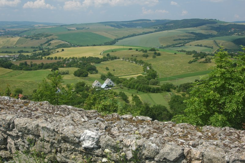 Podbranč